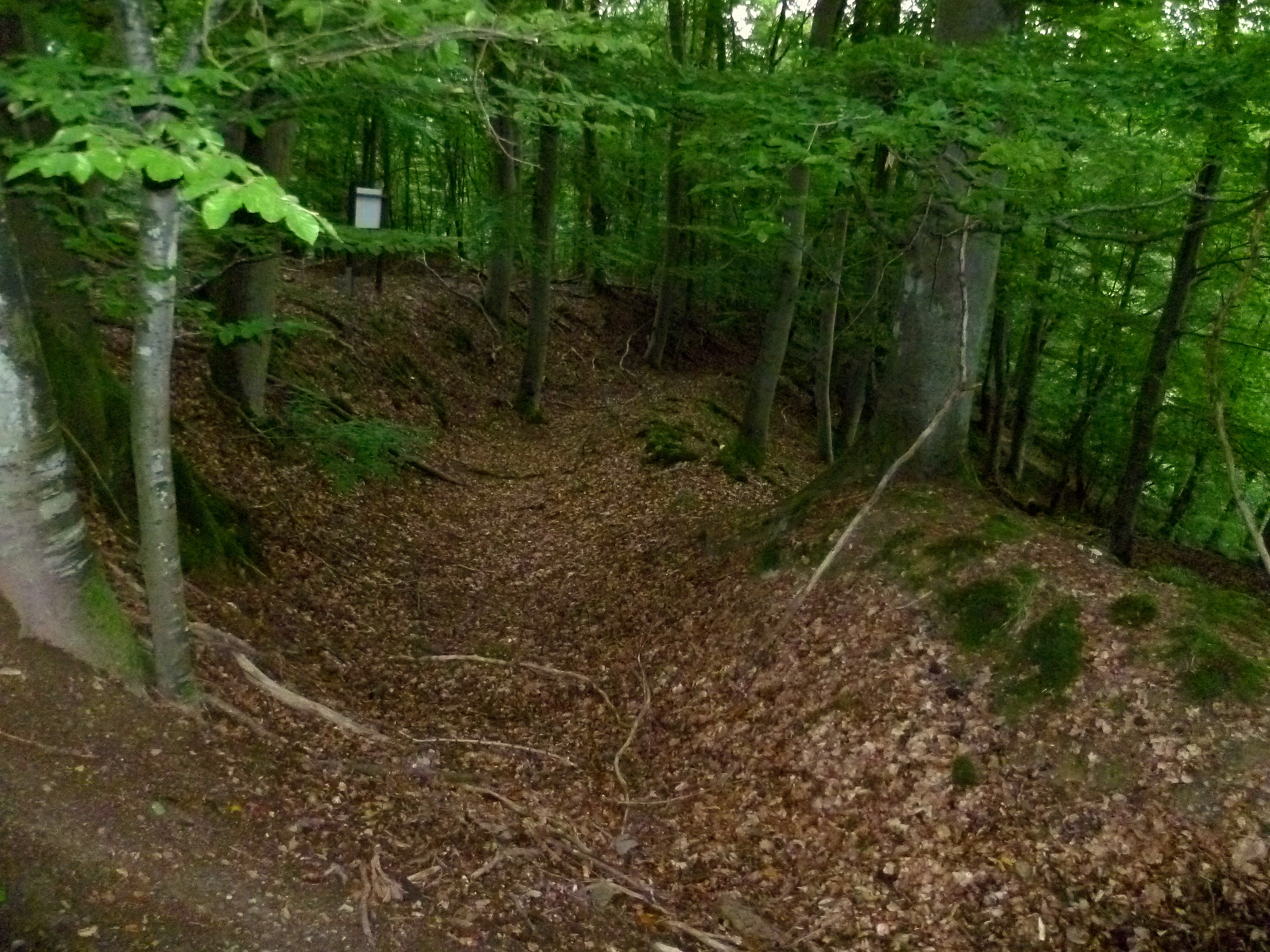 Einer der Hohlwege an der Hennethaler Landwehr